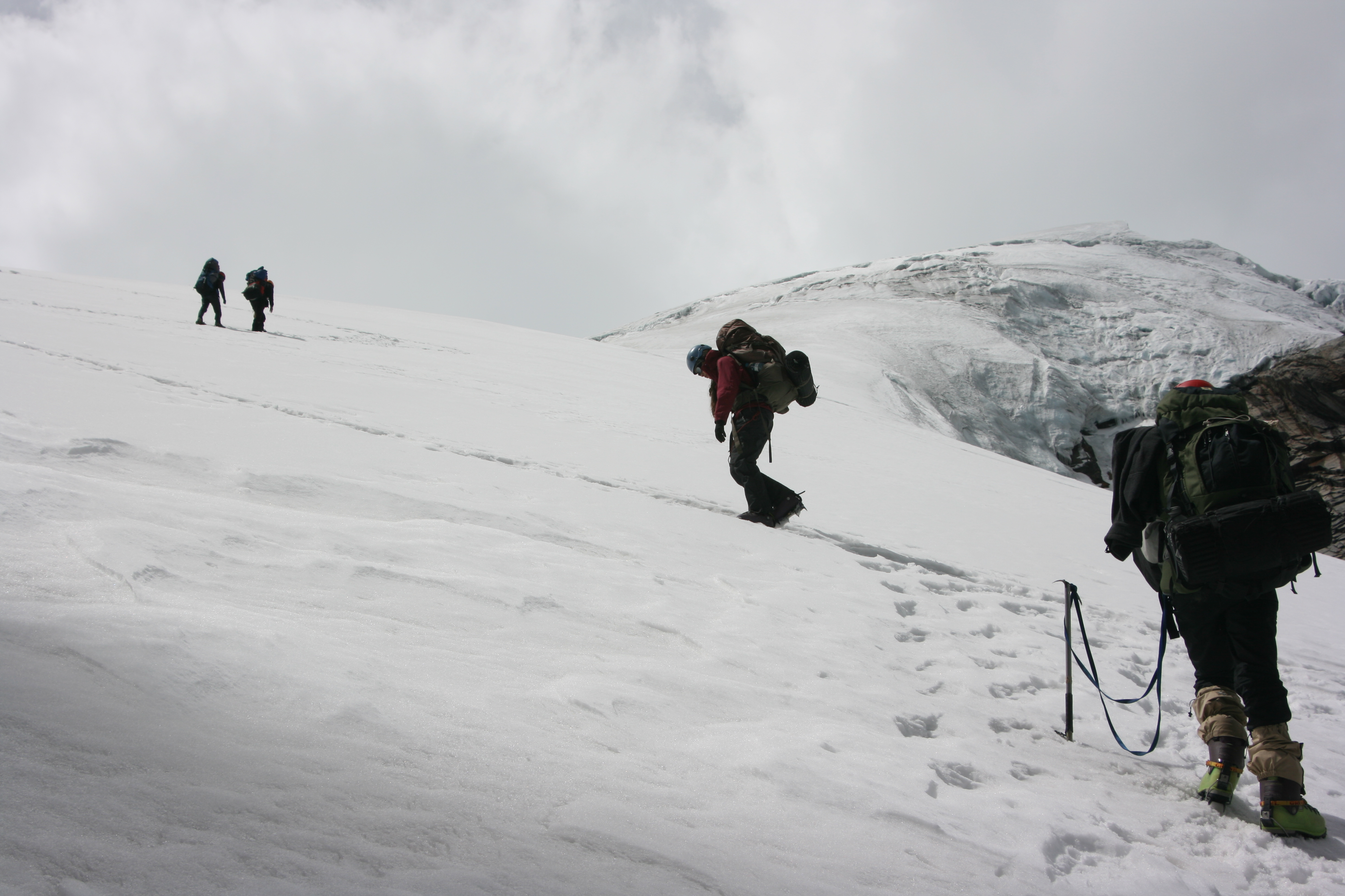 Aproximación a Campo Alto del Nevado Copa